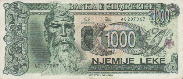 Lek je narodna denarna valuta